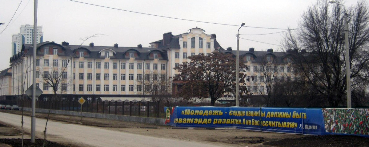 ЧГУ